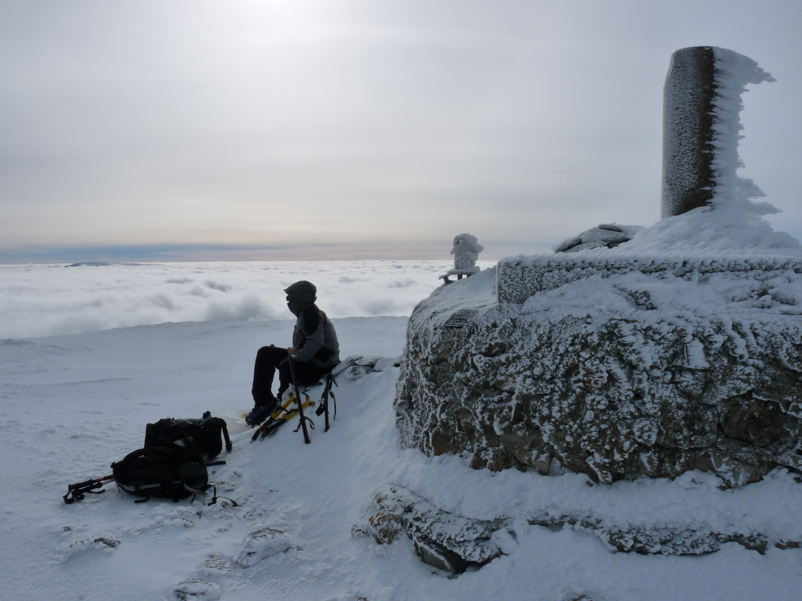 Pico mas alto de la provincia de Burgos